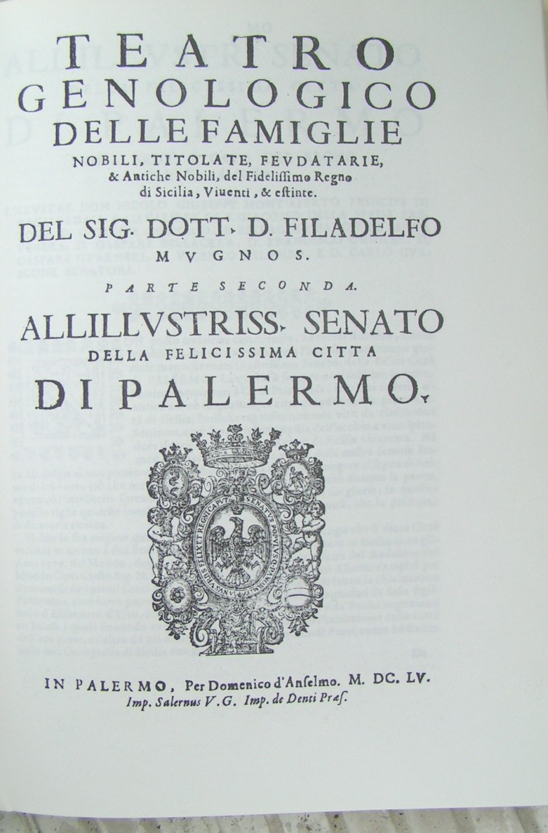 Titelseite des Wekes von Mugnos